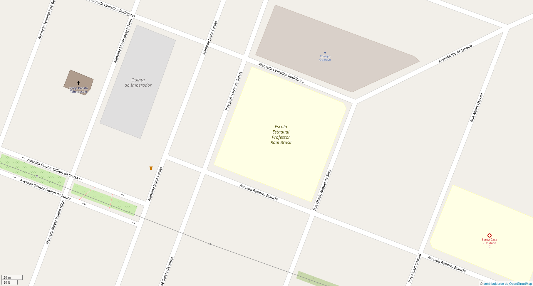 Mapa dos arredores da Escola Estadual Professor Raul Brasil, em Suzano